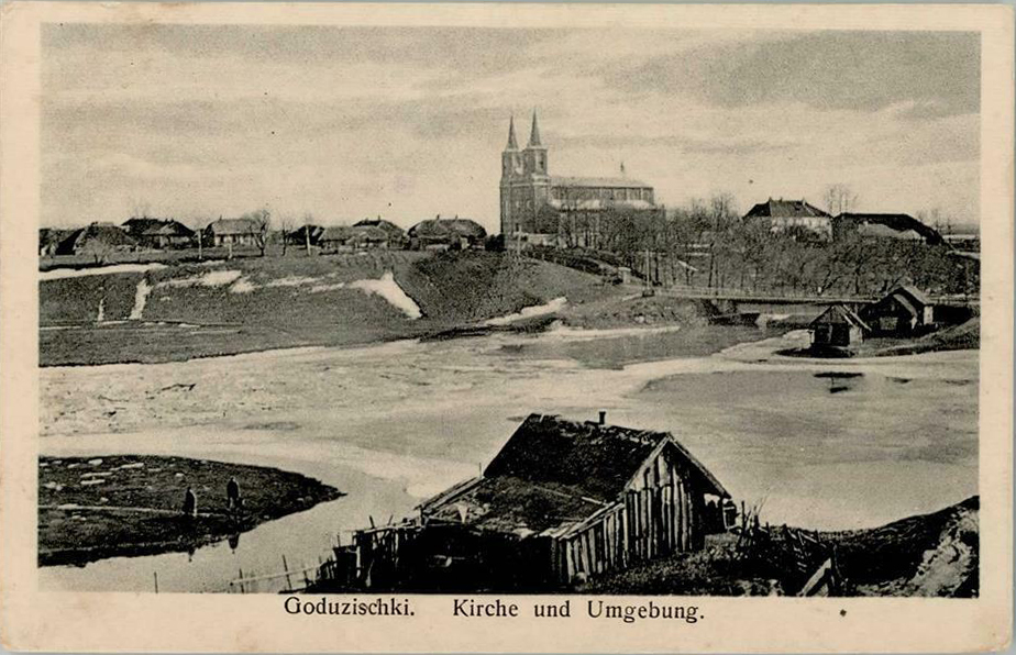 Беларуская (тарашкевіца): Гадуцішкі (Haduciški), рака Камайка (Kamajka). Касьцёл